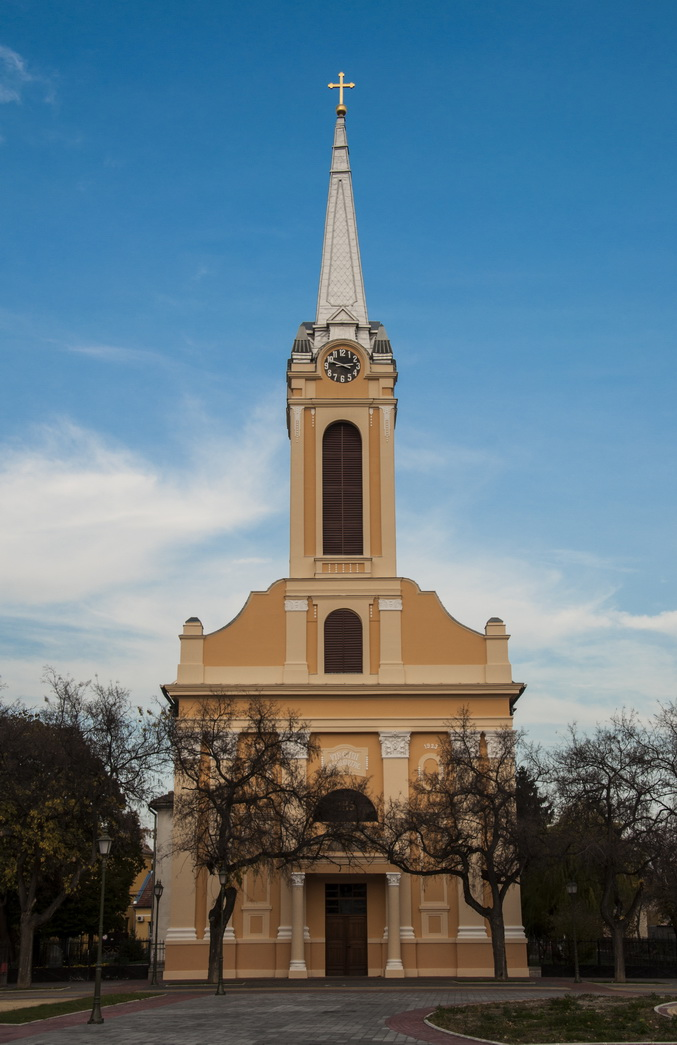 A belvárosi Nagyboldogasszony templom homlokzata a felújítás első fázisának befejezte után.